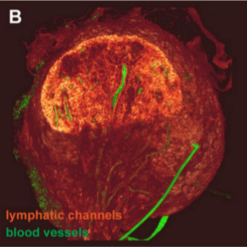 Fig. 1. Imágenes 3D detalladas de la red de conductos en un ganglio linfático completo. Las imágenes EVIS de un ganglio linfático (LN) poplíteo completo generaron una imagen de volumen en 3D. (B) La reconstrucción tridimensional de la imagen de todo el ganglio muestra canales linfáticos llenos de la molécula trazadora WGA (brillo rojo) junto con vasos sanguíneos marcados con dextrano (verde).